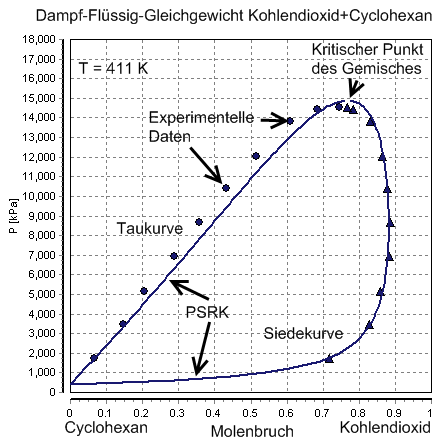 Cyclohexan-Kohlenstoffdioxid-Dampf-Flüssig-Gleichgewicht, PSRK-Vorhersage